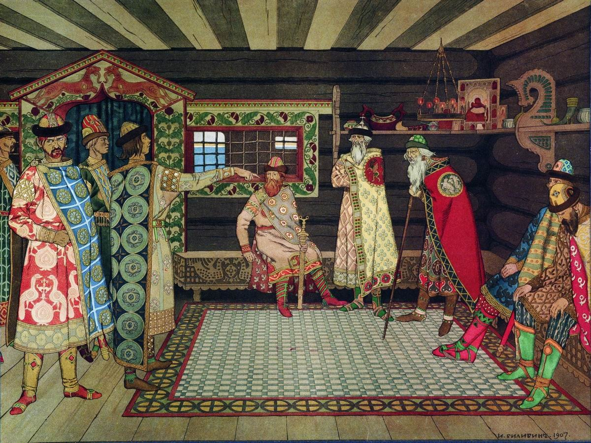 Съезд князей